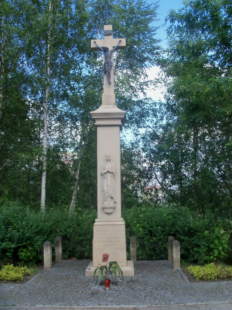 Krzyż przydrożny na Osiedlu Witosa w Katowicach (Skwer Rotmistrza Witolda Pileckiego - skrzyżowanie ulic W. Witosa i M. Ossowskiego)